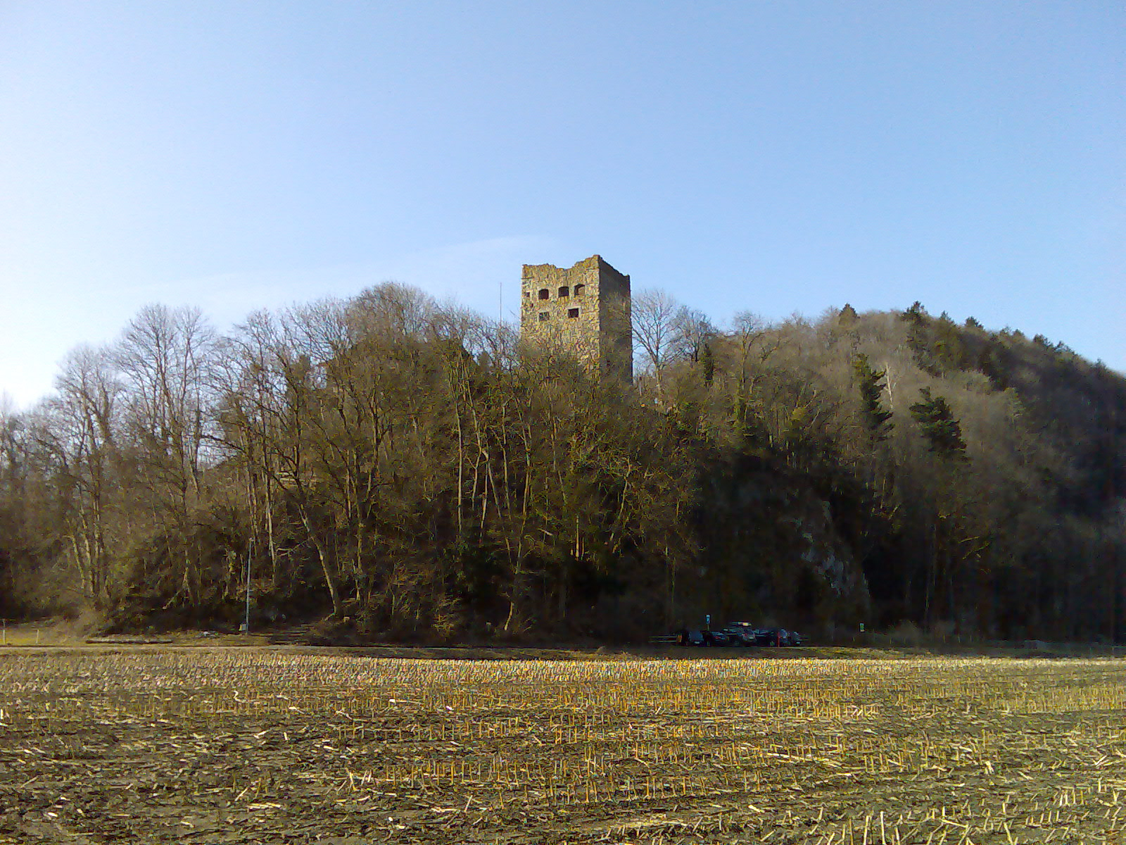 Burgruine "Schloss Blatten" aus nordöstlicher Richtung (ohne Schnee)